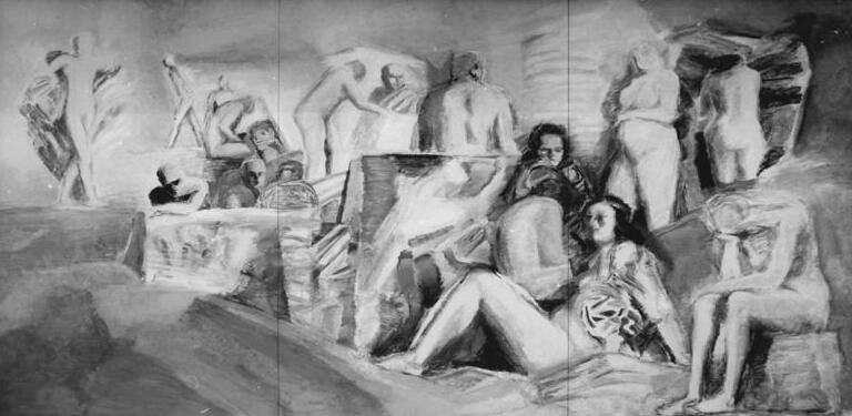 ADN-ZB Repro-6.5.76 Berlin-Gemälde im Palast der Republik.-Zahlreiche bildende Künstler haben unseren Palast der Republik durch eine Fülle von Kunstwerken bereichert. Der Maler Hans Vent weitet in geschichtliche Gegebenheiten einer Strandszene zu einem poetischen Bild des Lebens aus. Sein Grundton ist die Bejahung des Einklangs der Menschen untereinander und mit der Natur durch Bekräftigung sinnlicher Schönheit.